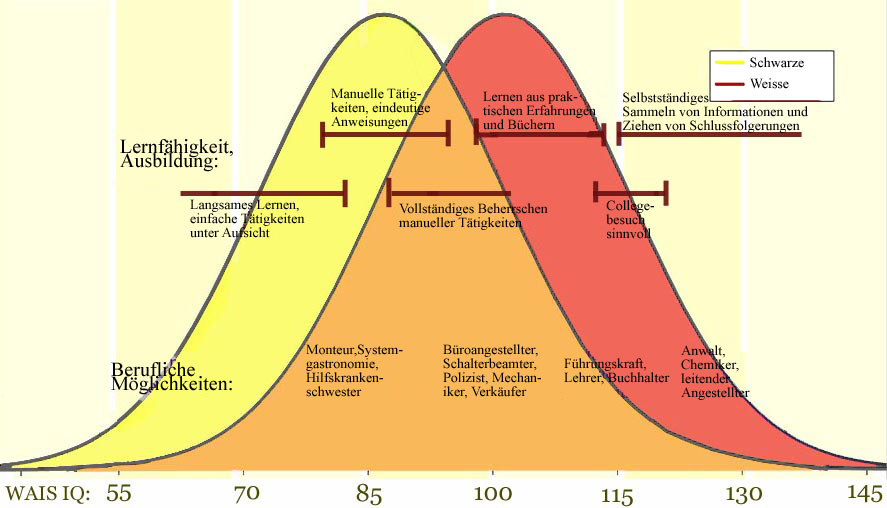 Zusammenhang zwischen IQ, Berufsmöglichkeiten und Rasse nach Social Consequences von Linda Gottfredson.